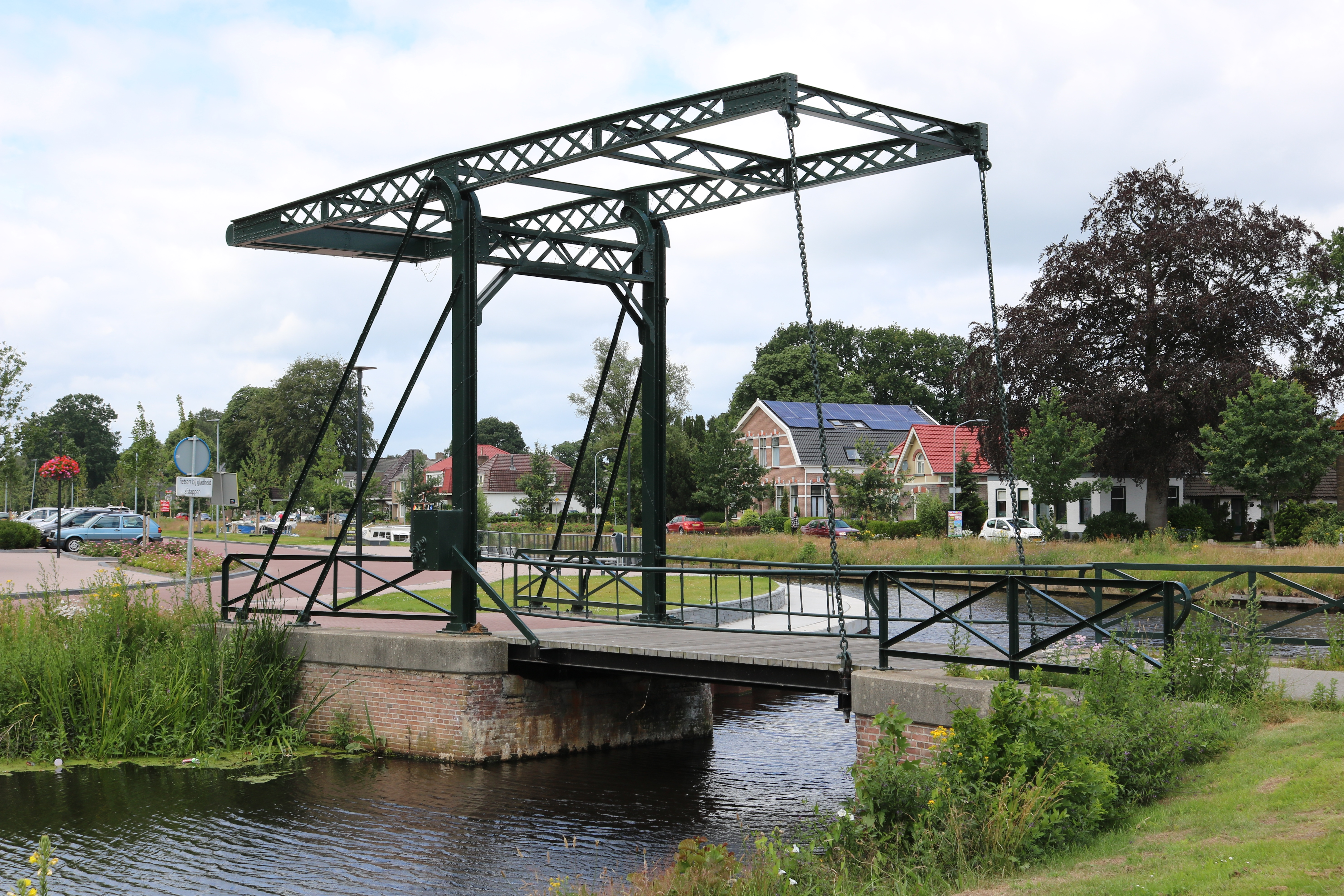 Voormalige trambrug in Nieuw-Amsterdam (foto: Daniel van der Ree, 23 juni 2018)